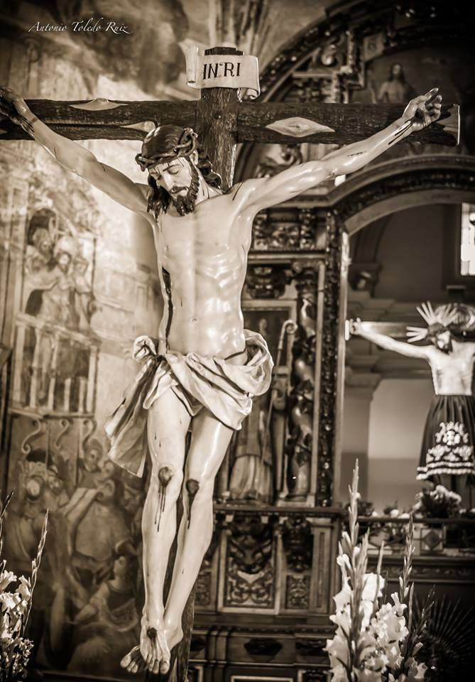 IMAGEN CRISTO DE LA SANGRE EN TORRIJOS -FOTO PROPIEDAD DE ANTONIO TOLEDO RUIZ